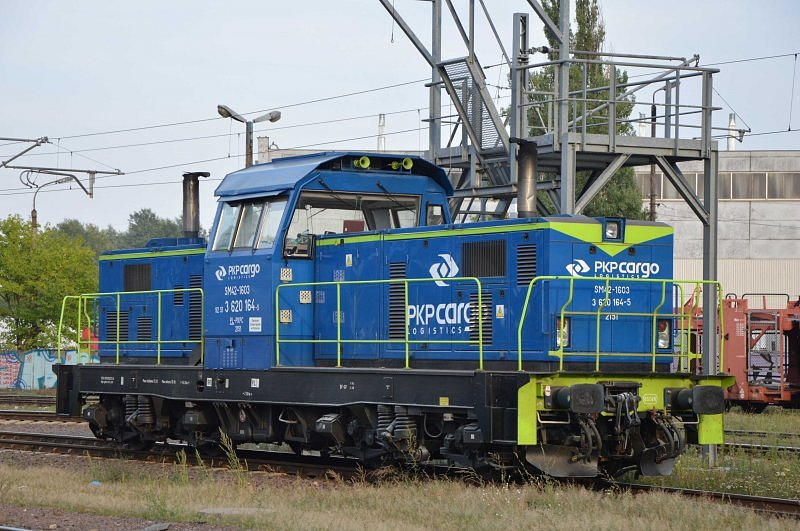 Lokomotywa spalinowa SM42-1603 na stacji Poznań Wschód.